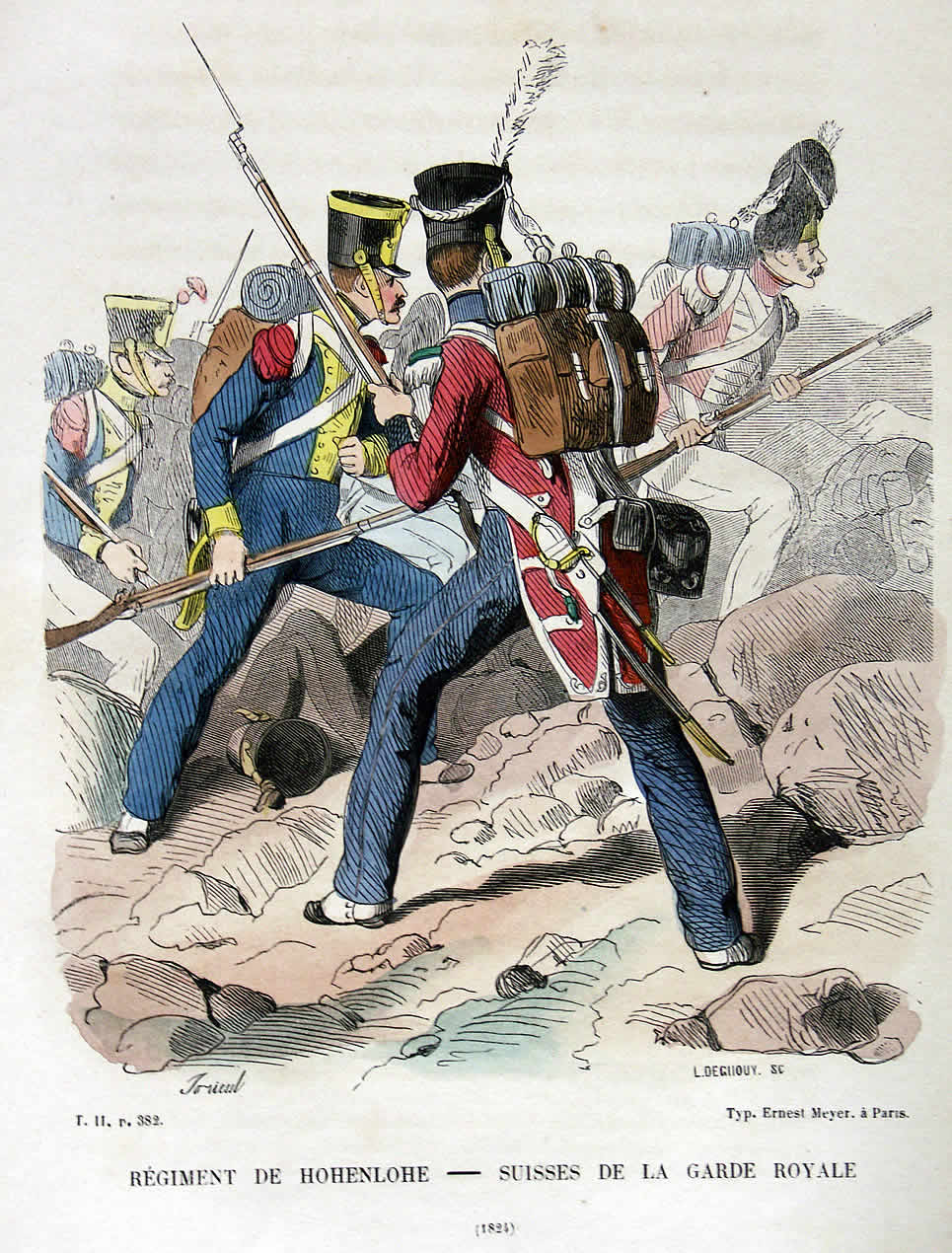 Angehörige der Regimenter de Hohenlohe und der Schweizer Truppen der Königlichen Garde 1824